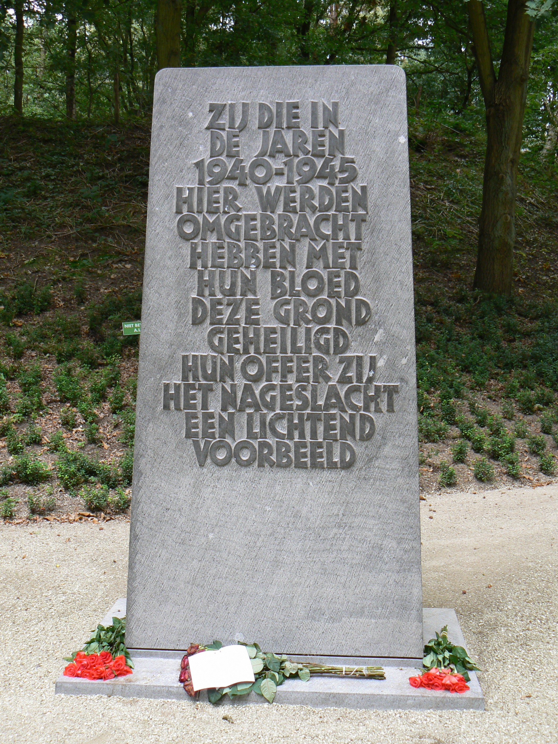 Gedenksteen (1952) Kamp Amersfoort, the Netherlands